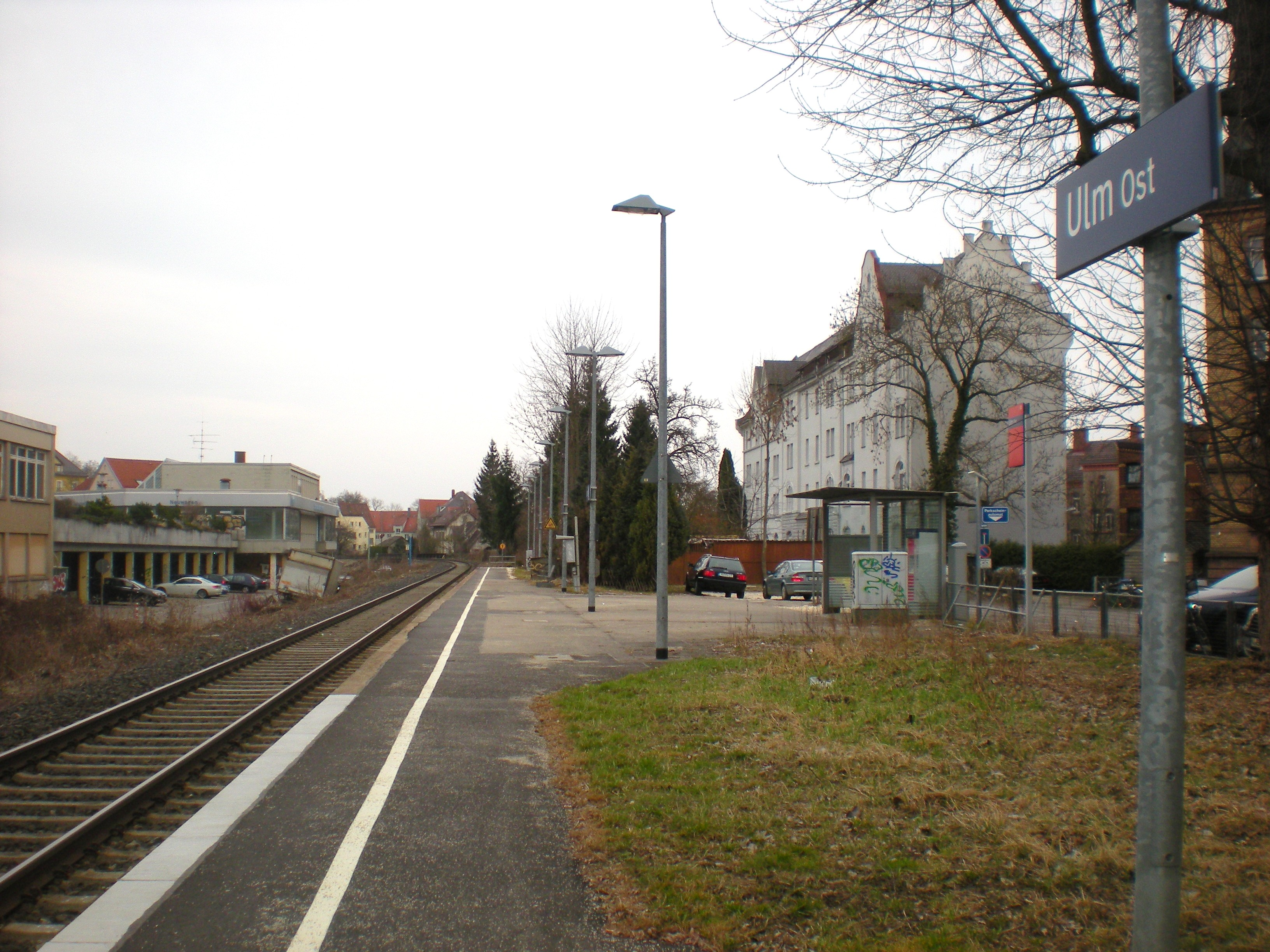 Bahnsteig und Wartehäuschen des Haltepunkts Ulm Ost an der Brenzbahn